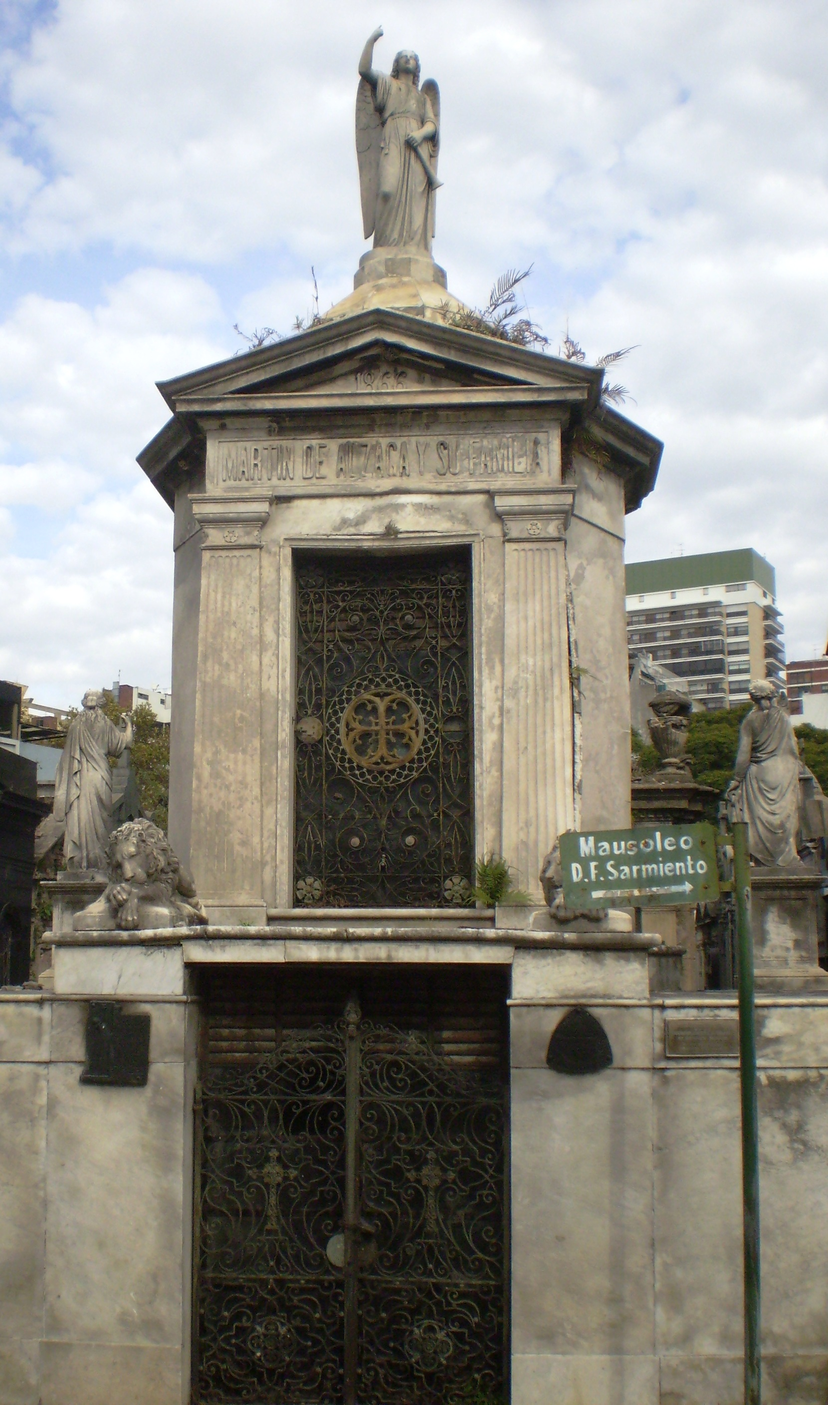 Boveda de Martín de Álzaga , descansan allí los restos de Felicitas Guerrero de Álzaga , Cementerio de la Recoleta, Buenos Aires.